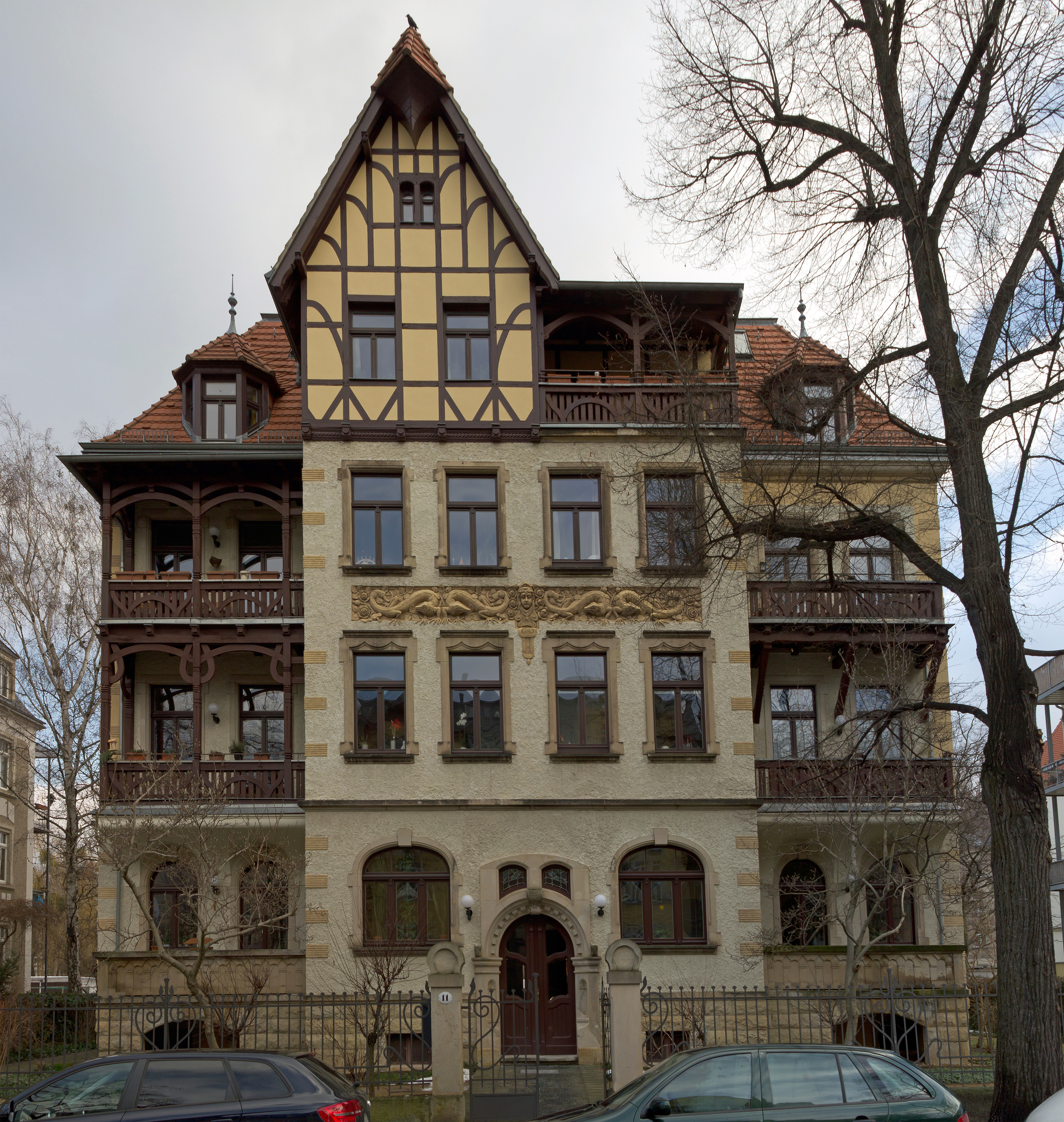 Mietvilla Reinickstraße 11 in Dresden